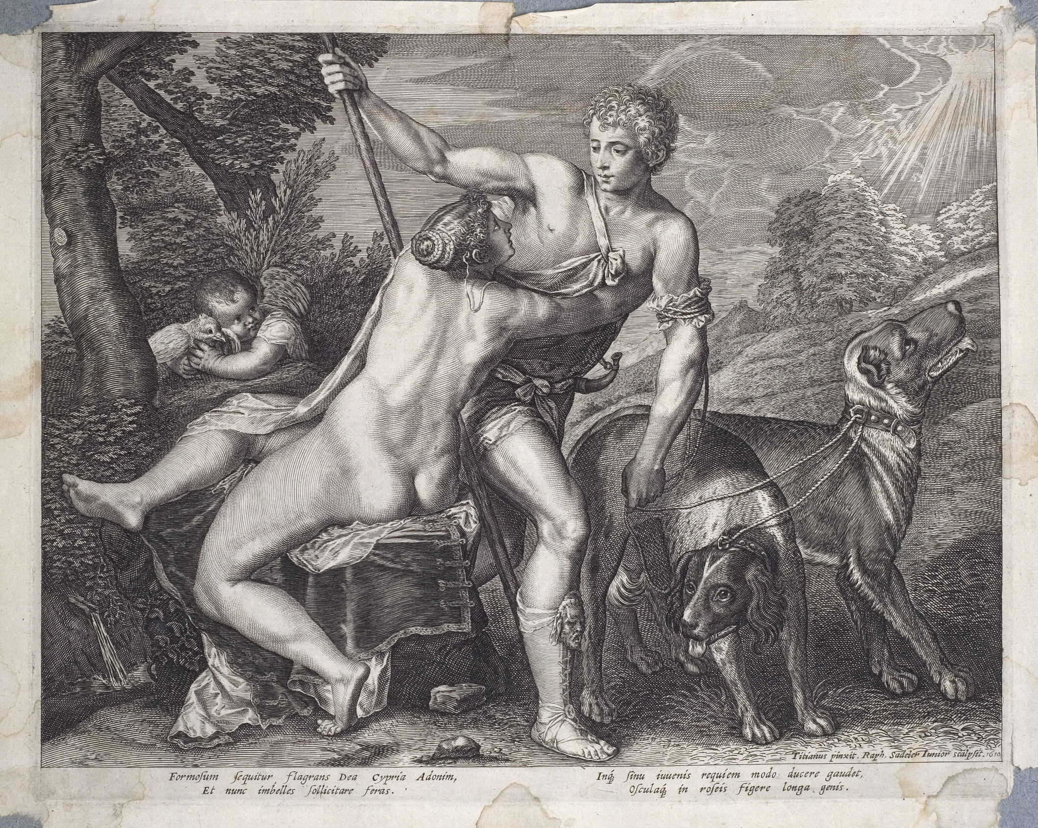 Grafik aus dem Klebeband Nr.13 der Fürstlich Waldeckschen Hofbibliothek Arolsen Reproduktion eines Gemäldes von Tizian (Szene aus Ovids Metamorphosen: Venus und Adonis)